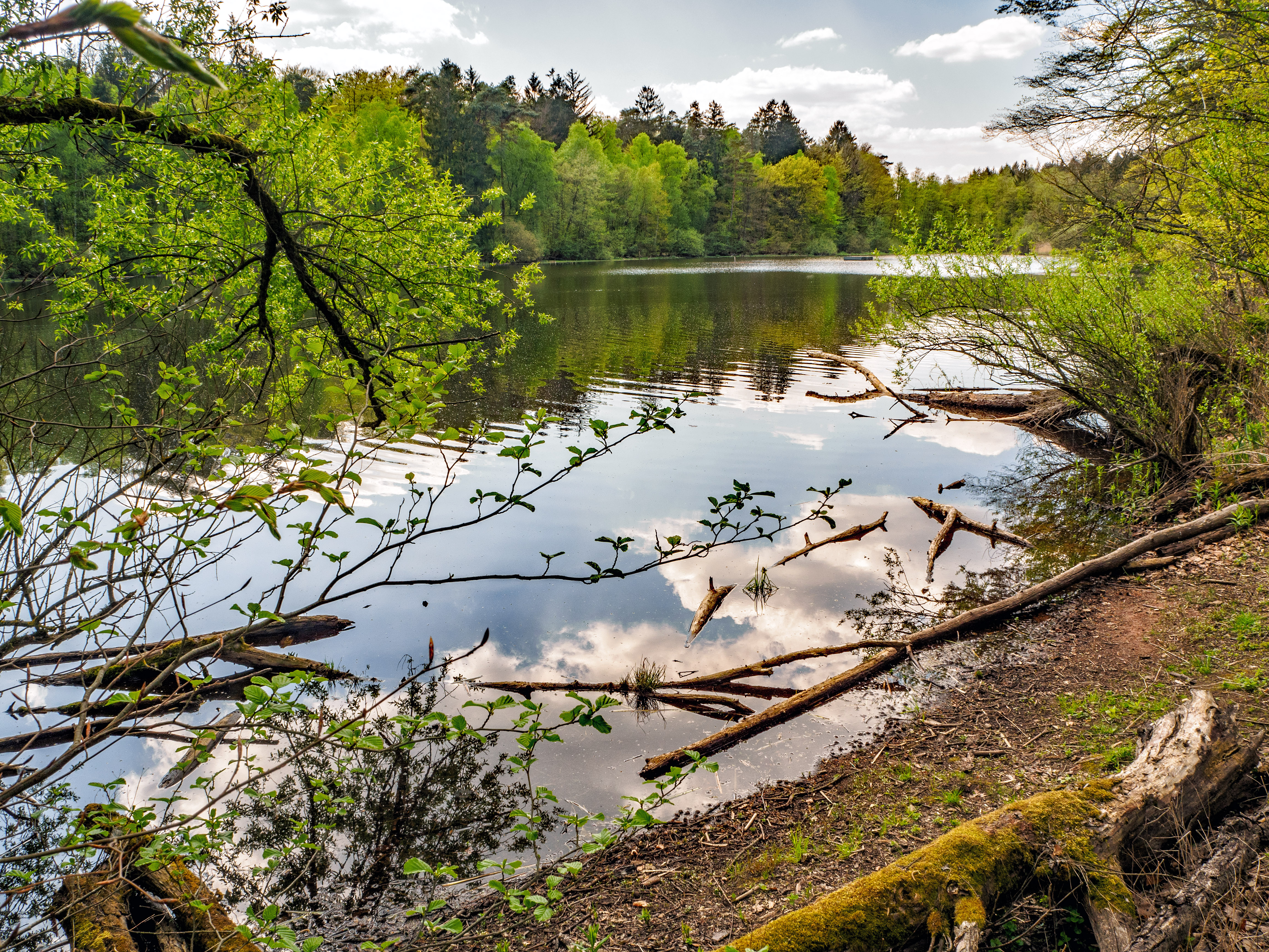 Spickelweiher im Naturschutzgebiet „Jägersburger Wald/Königsbruch“ (NSG-109)